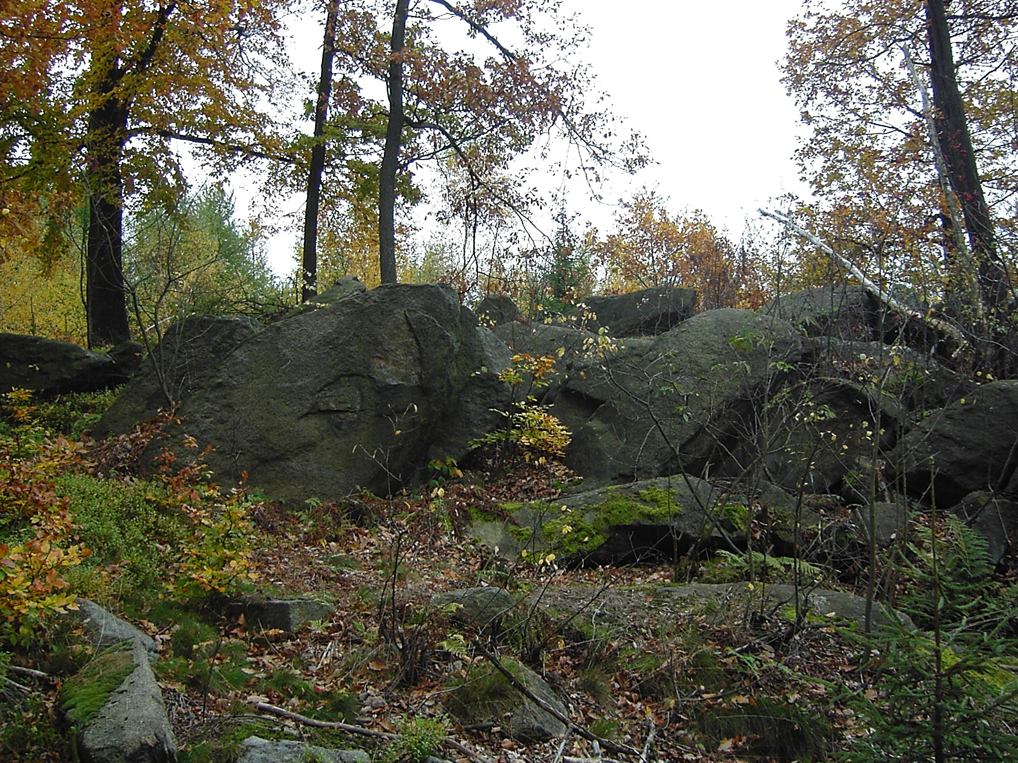 Liščí kameny, vrch mezi Mikulášovicemi a Velkým Šenovem